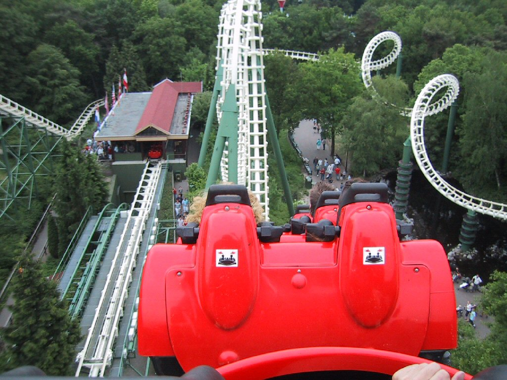 Efteling - Pyhon achtbaan